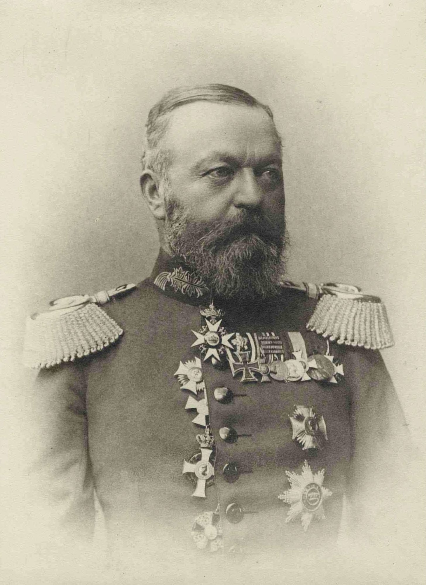 Rudolf von Freudenberg, 1918